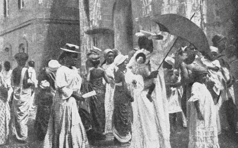 Saliendo de misa (Corisco) — Spanish Equatorial Guinea.